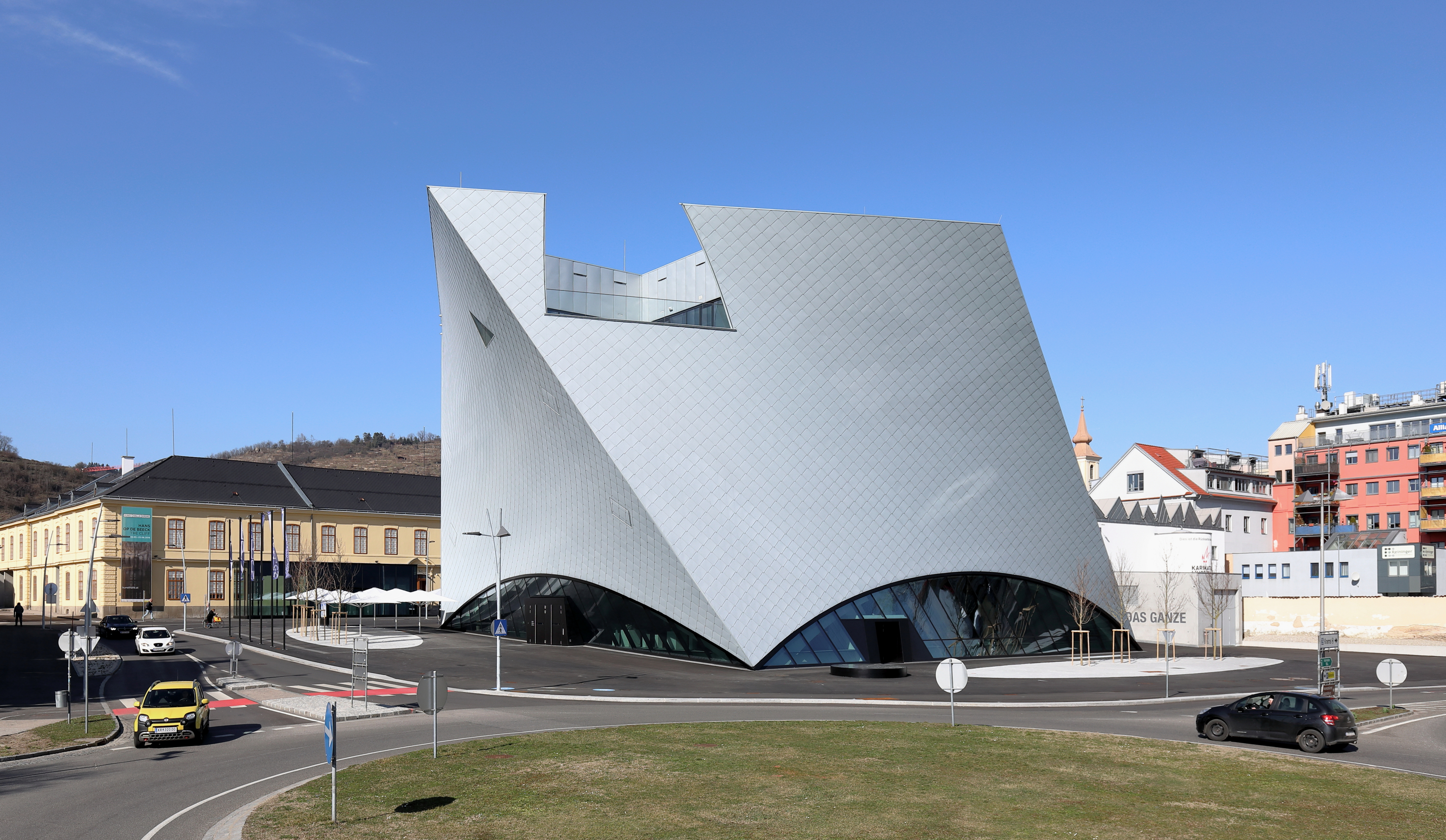 Südansicht des neuerrichteten Museumgebäudes „Landesgalerie Niederösterreich“ in der Stadtgemeinde Krems an der Donau.Der Bau mit 3.000 m² Ausstellungsfläche auf fünf Ebenen wurde von 2016 bis 2019 um ca. 35 Mio. € nach Plänen des Architektenbüros Marte.Marte von der Baufirma Dywidag errichtet.